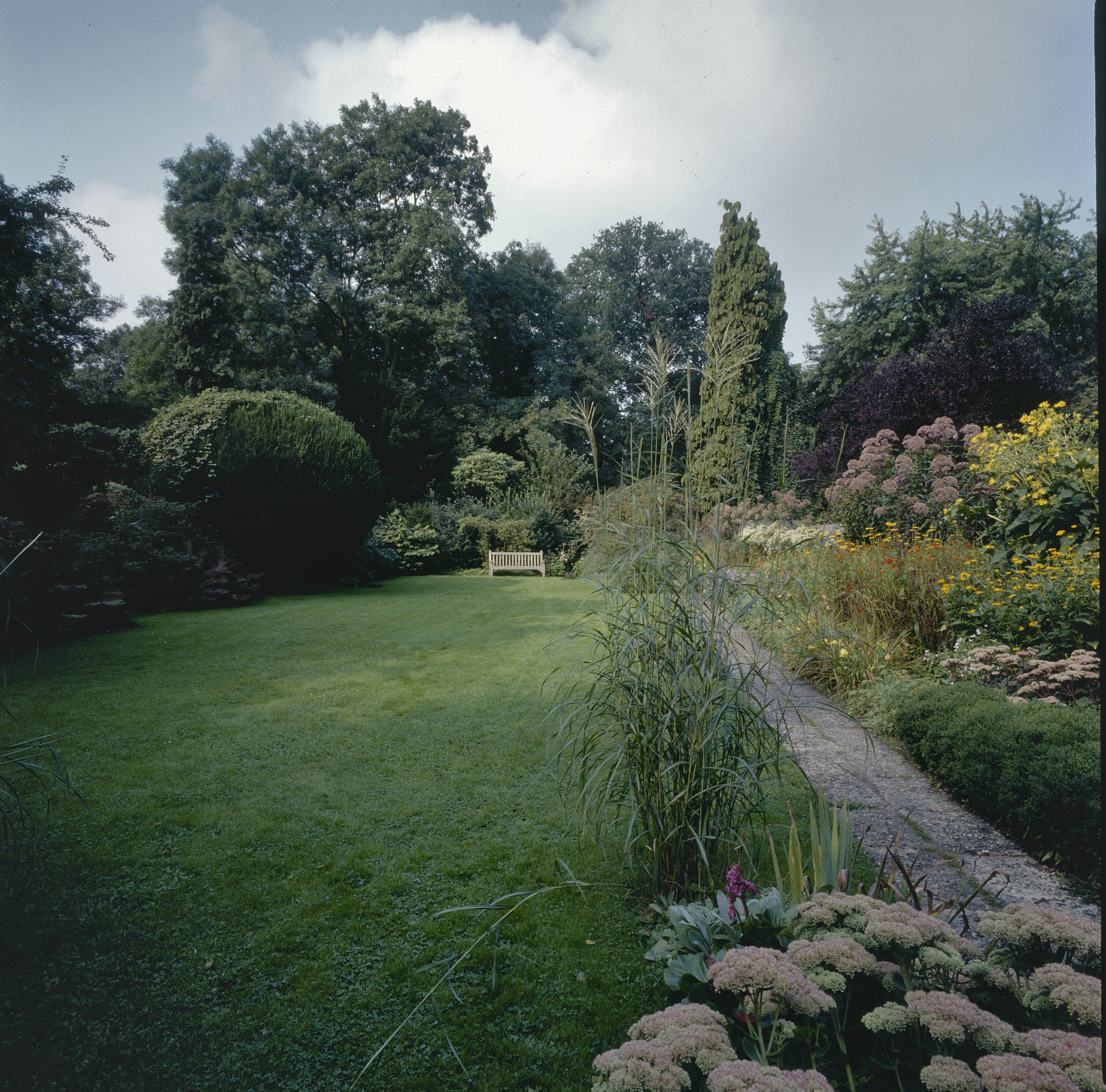 De tuinen van Mien Ruys: Overzicht van de oude proeftuin uit 1927